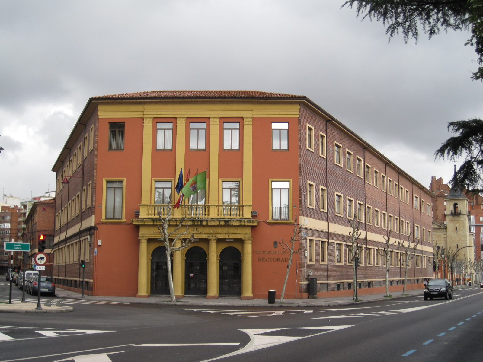 Rectorado de la Universidad de León (España).